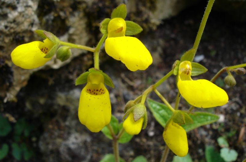 Calceolaria en fleurs, Jardin alpin, Jardin des Plantes de Paris